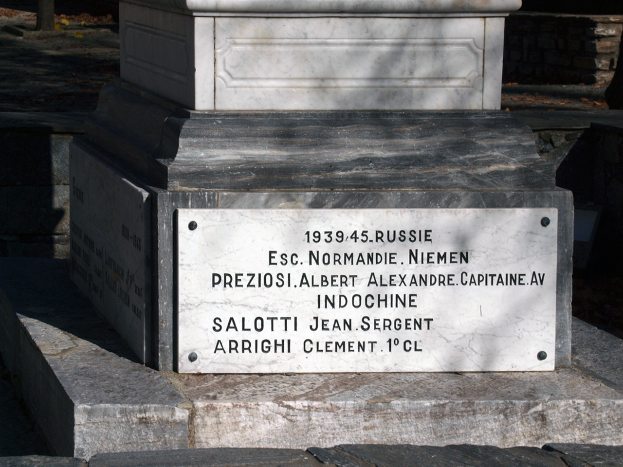 Vezzani (Corse) - Plaque au bas du monument aux morts avec le nom du capitaine aviateur Preziosi